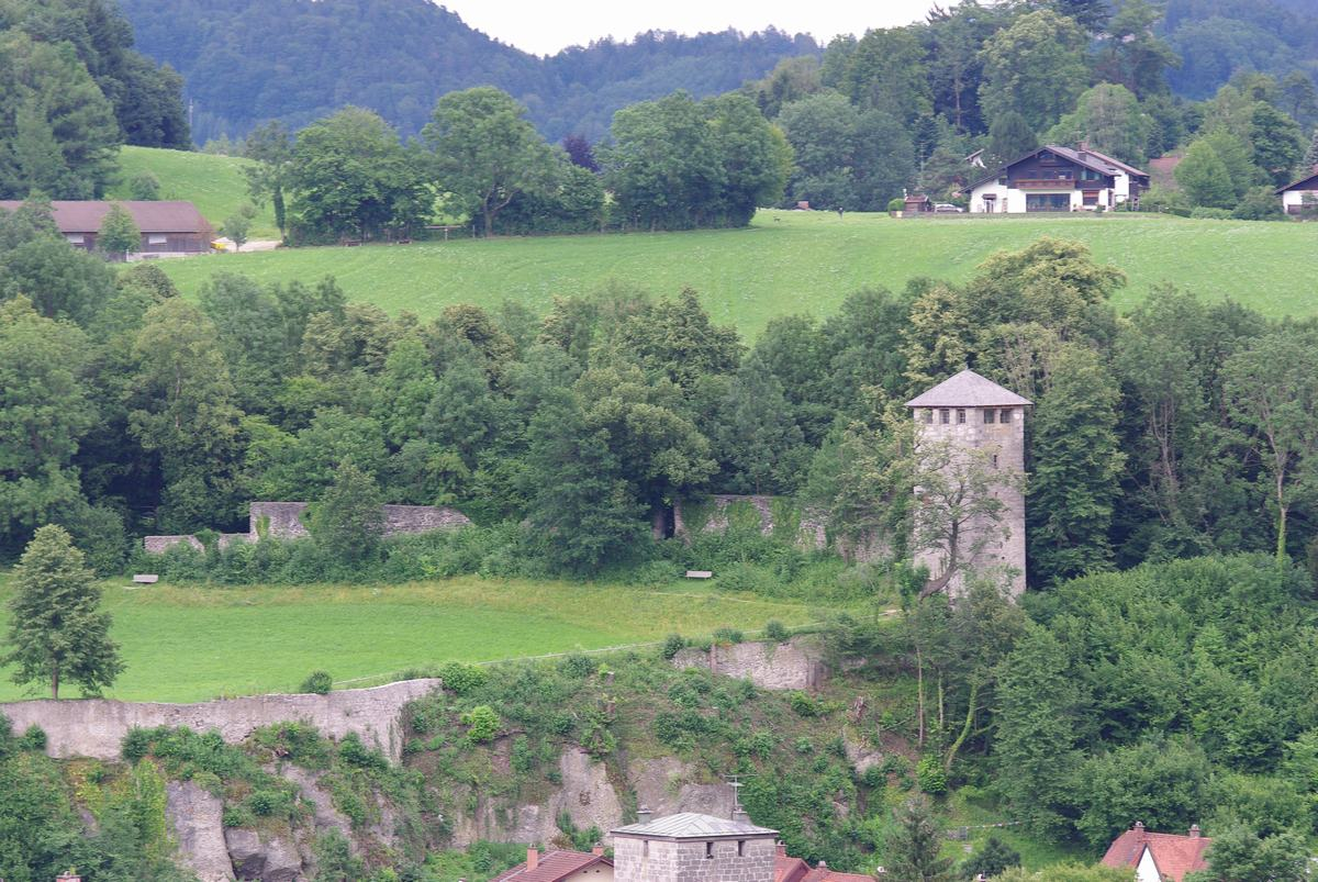 Teil der Stadtbefestigung von Bad Reichenhall mit Pulverturm, vom Schroffen aus.